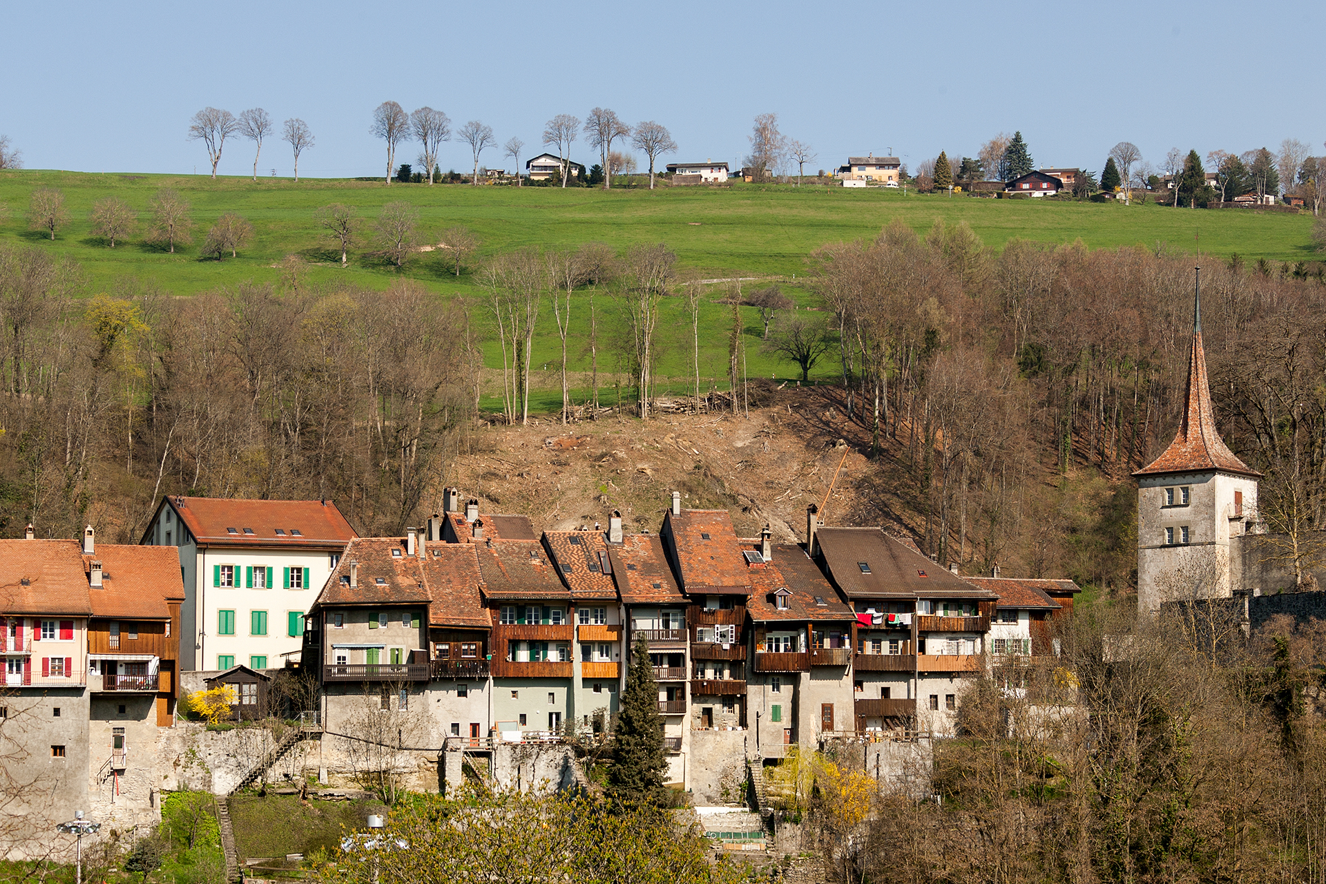 Obere Altstadt Bourg von Moudon (VD)